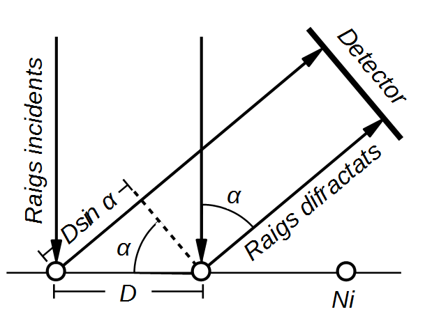 Esquema de la difracció d'electrons en un cristall de Ni a l'experiment de Davisson-Germer